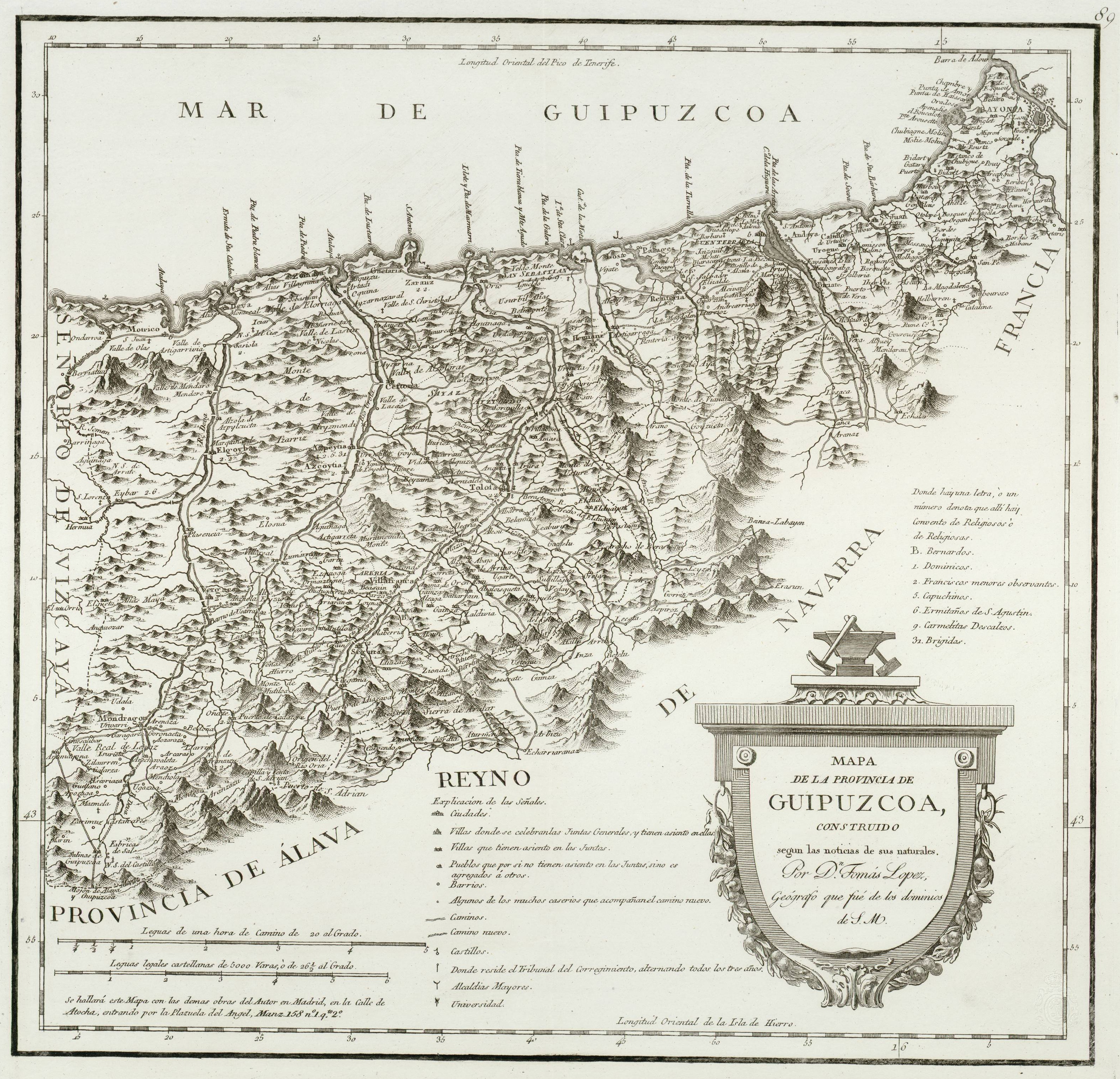 Mapa de la Provincia de Guipuzcoa